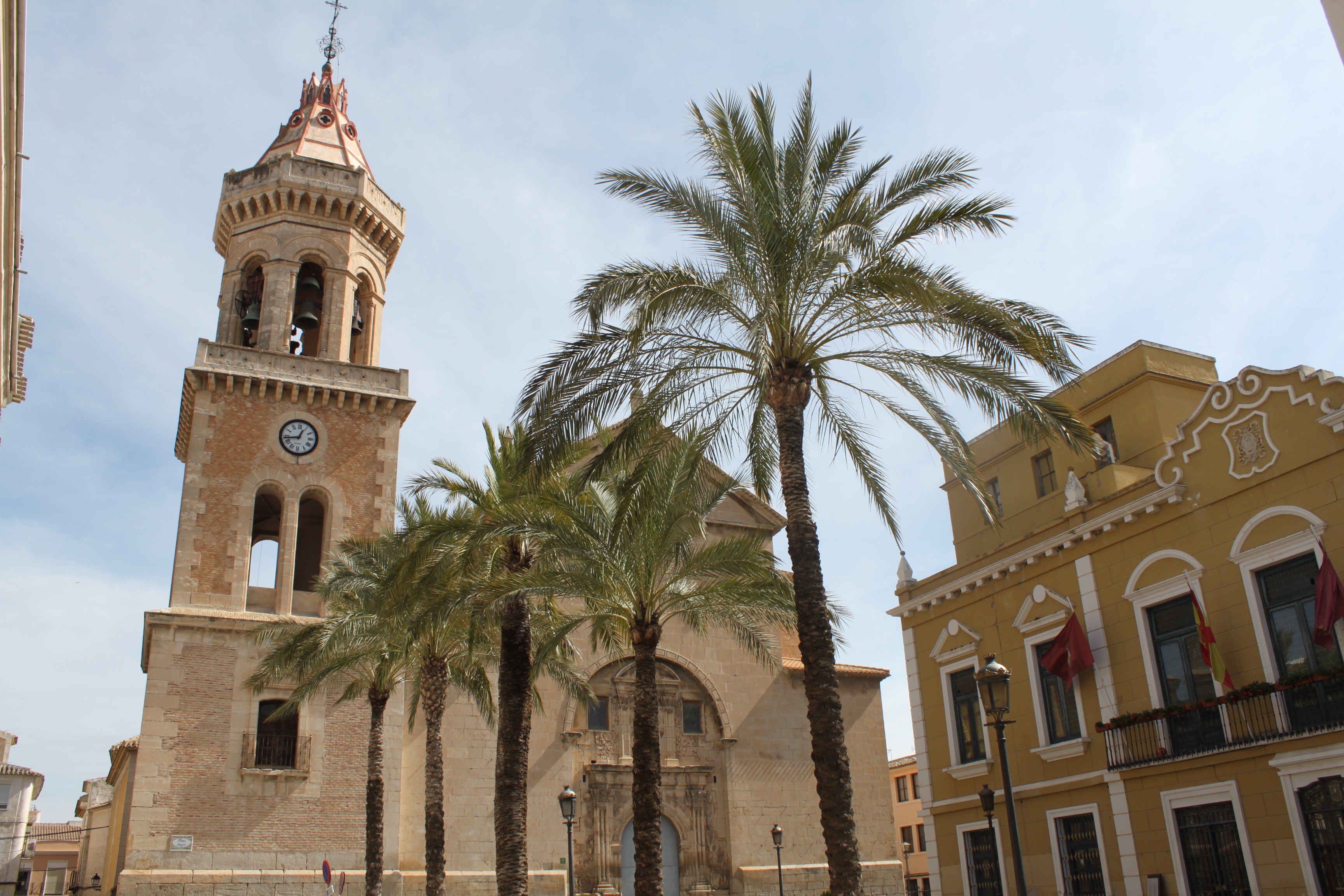 Imagen de la Basílica de la Asunción de Cieza (Región de Murcia, España) con el ayuntamiento de la ciudad a mano derecha.